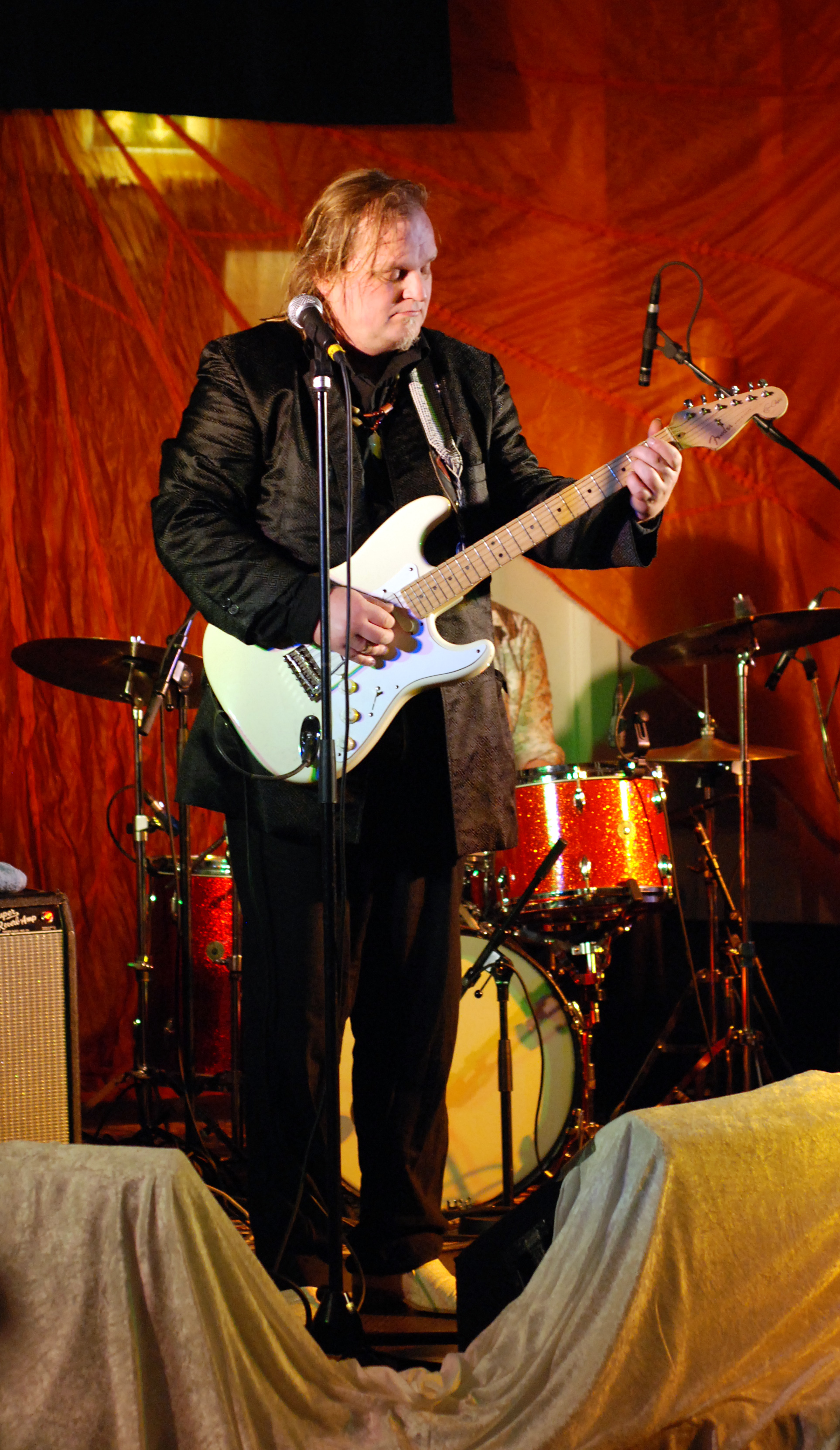 Knut Reiersrud at kommunestyresalen in gamle Hamar raadhus, in Hamar, Hedmark, Norway.